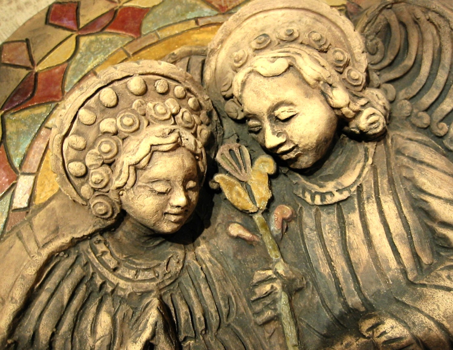 Petrás Mária kerámiája (angyali üdvözlet részlete)